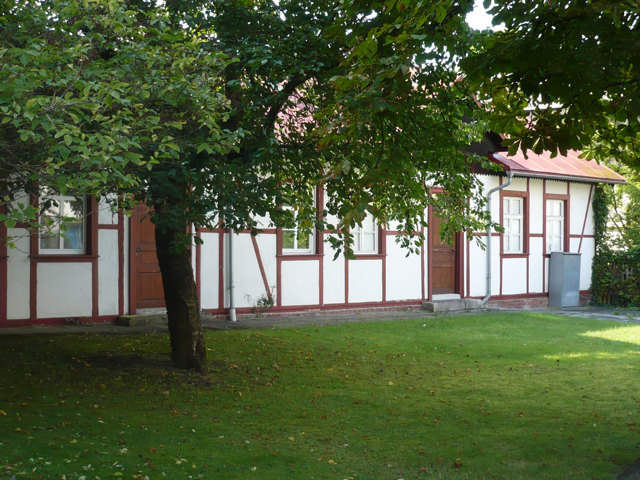 Schießhaus Moritzhöfen in Bayreuth